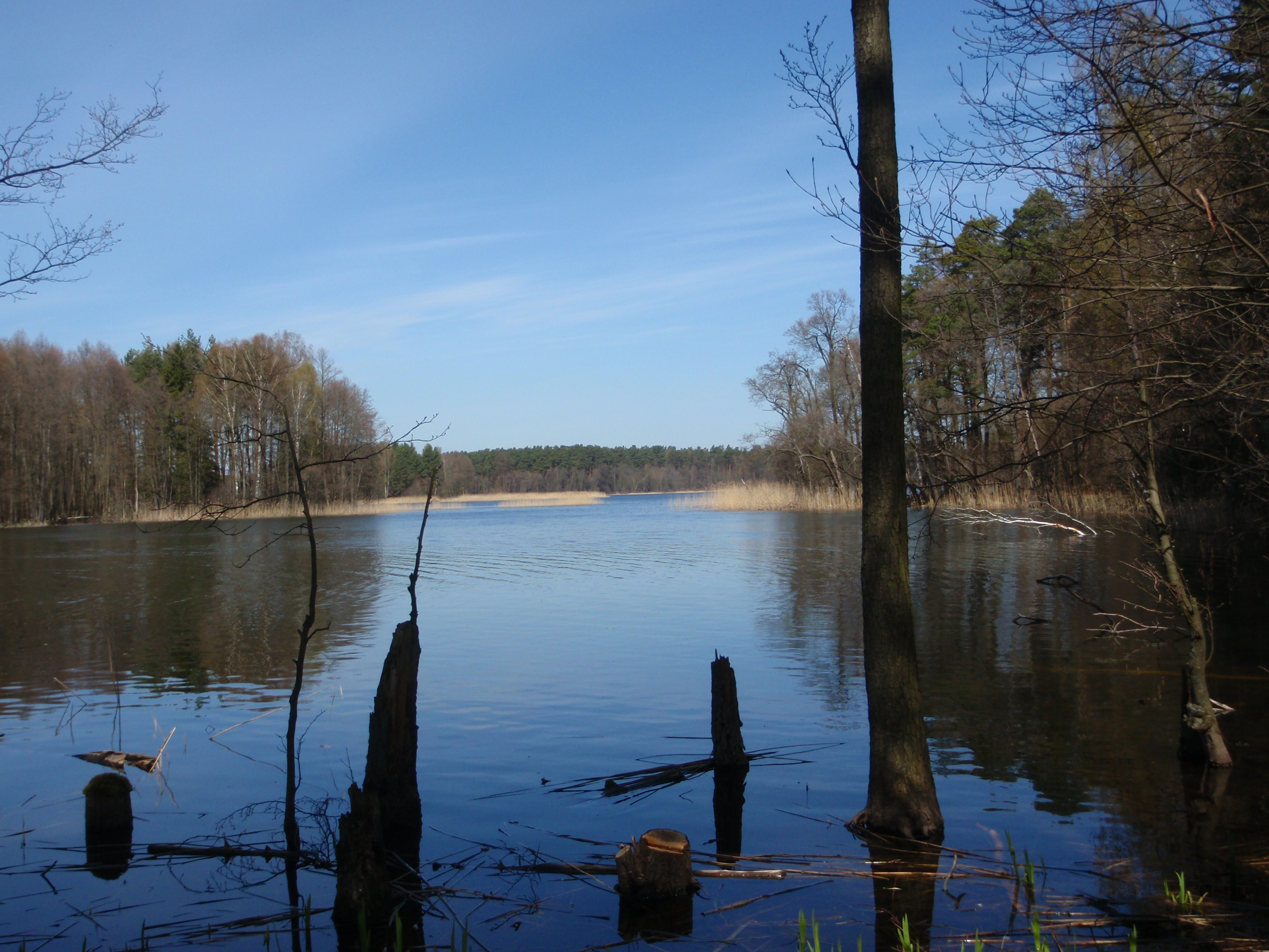 Widok na Jezioro Borówno.